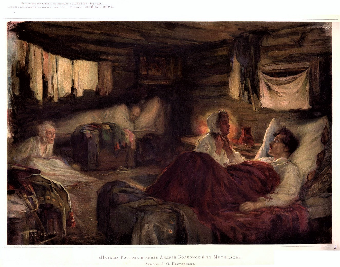 Наташа Ростова и князь Андрей Болконский в Мытищах. Акварель Л.О. Пастернака